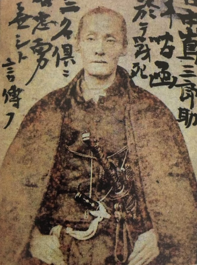 中島三郎助の肖像写真。